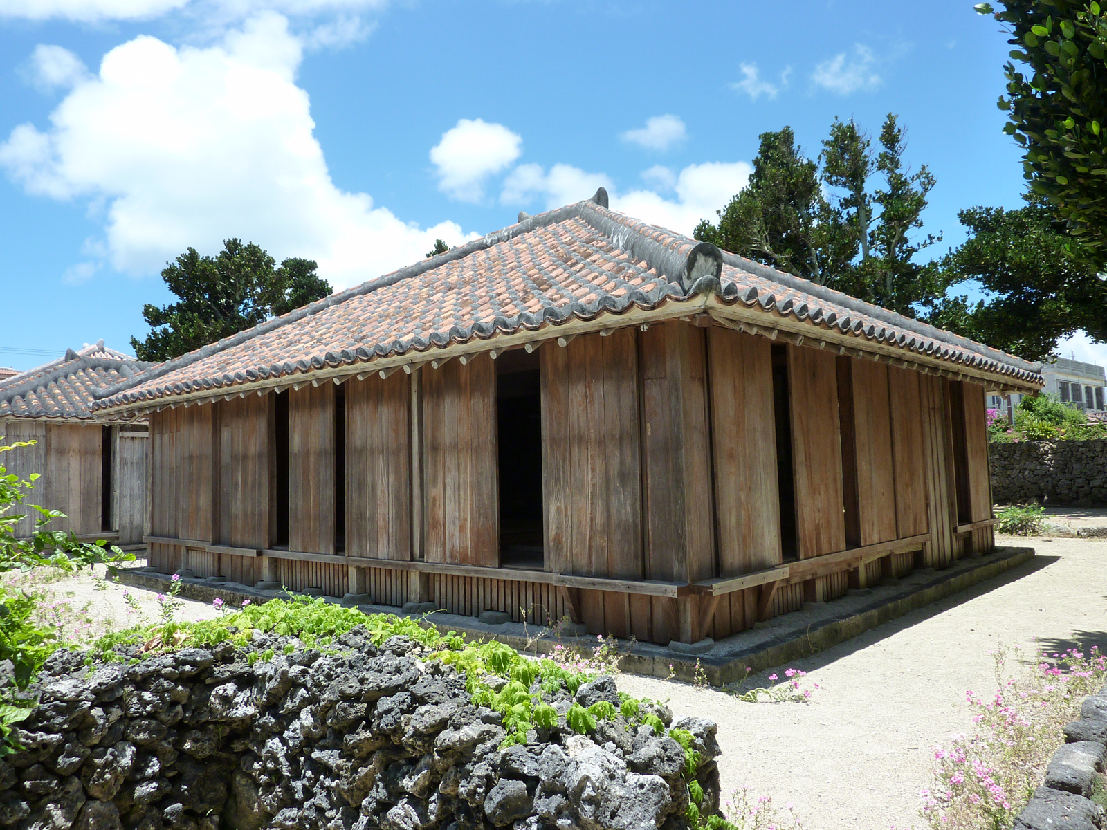 旧与那国家住宅（沖縄県八重山郡竹富町竹富島）